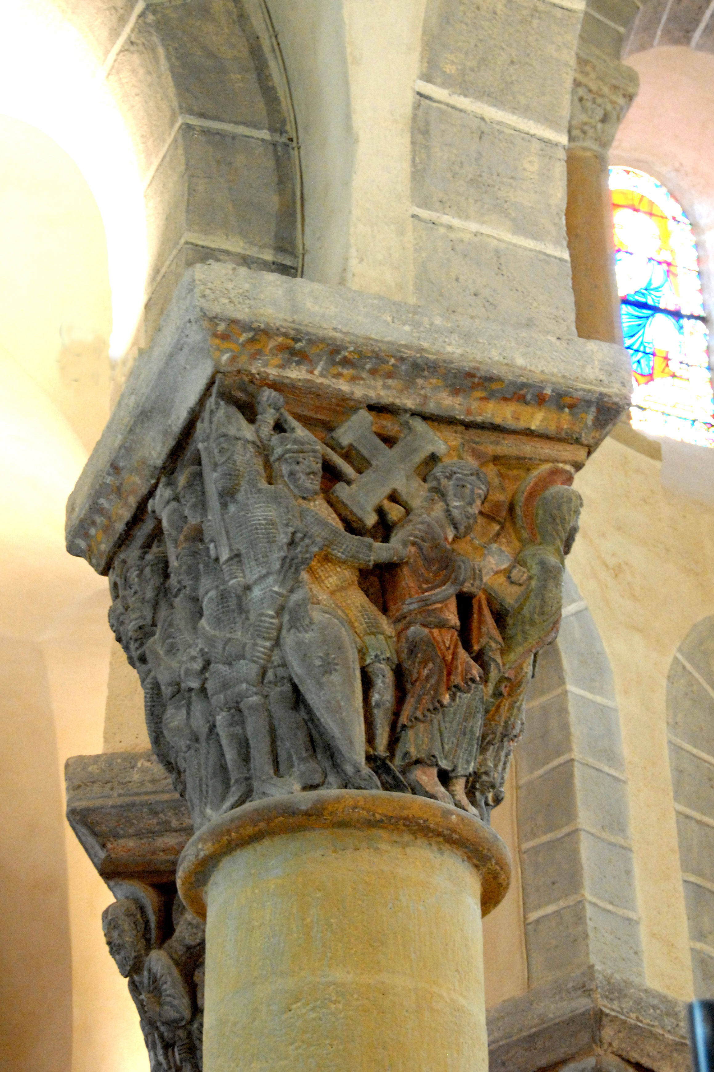 St.-Nectaire, Chorkapitell A, Seiten 2+3